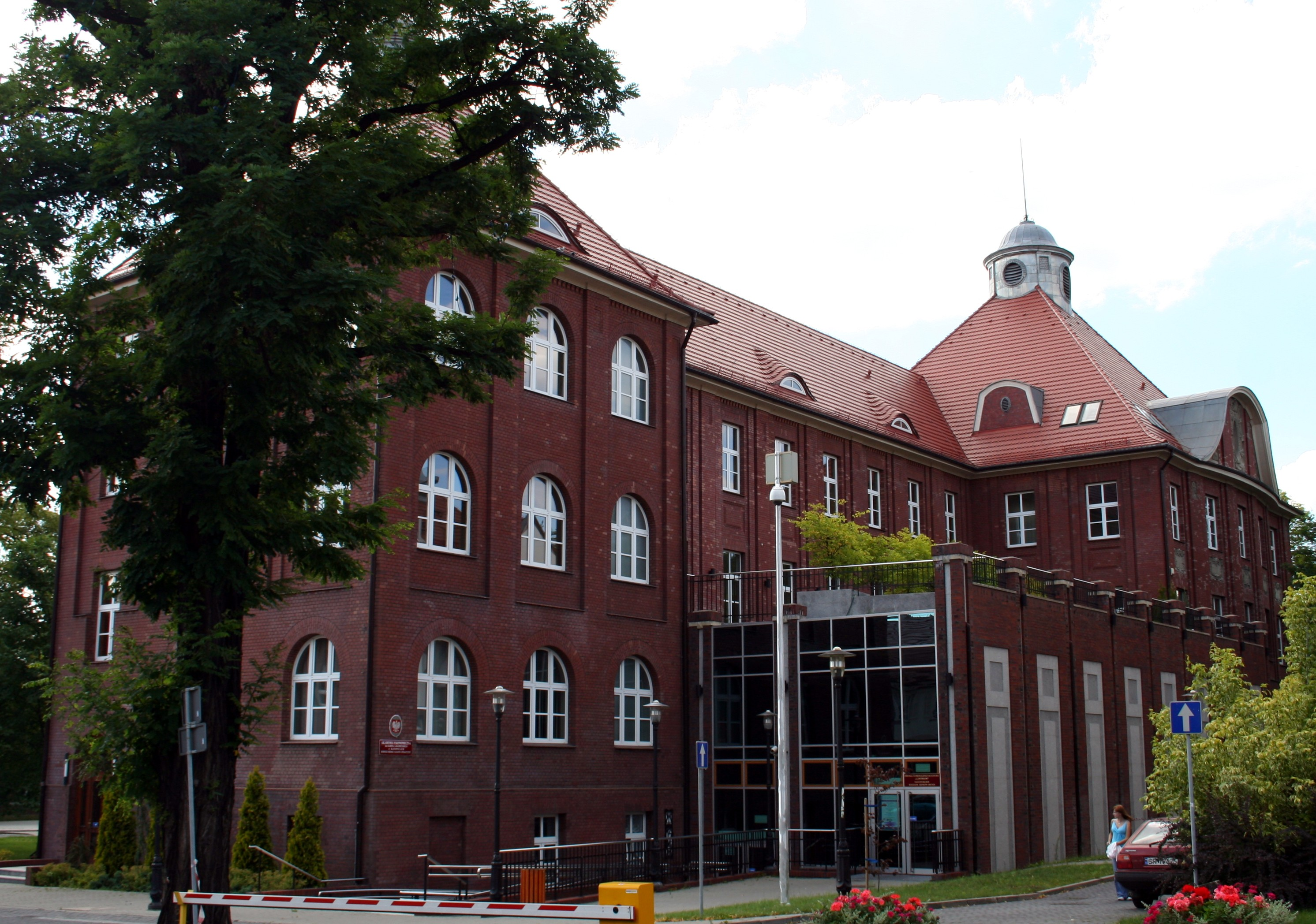 Rybnik - filia Akademii Ekonomicznej w Katowicach